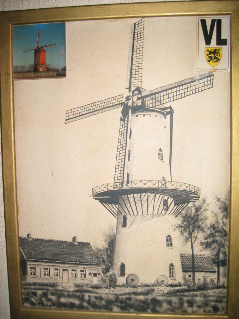 Afbeelding van de Couchezmolen, kleurenfoto in de bovenhoek is wel de Wullepitmolen.